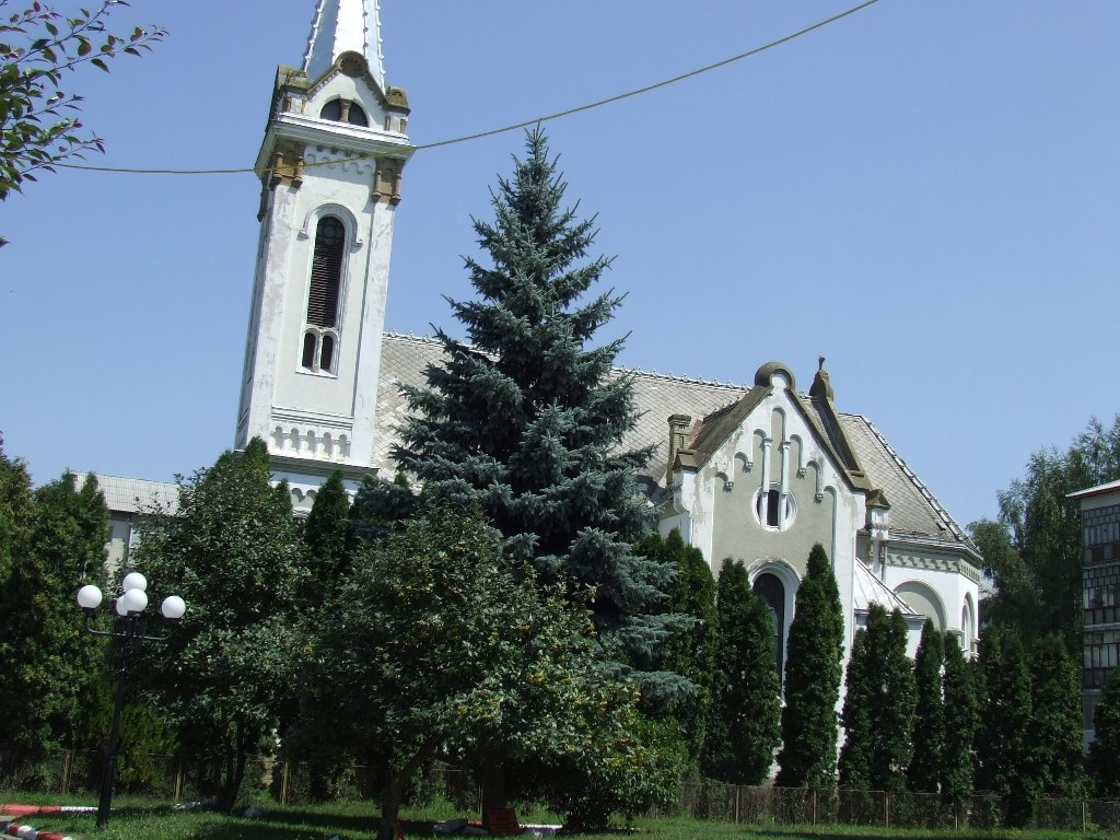 Church in Beclean, Bistriţa-Năsăud County, Romania